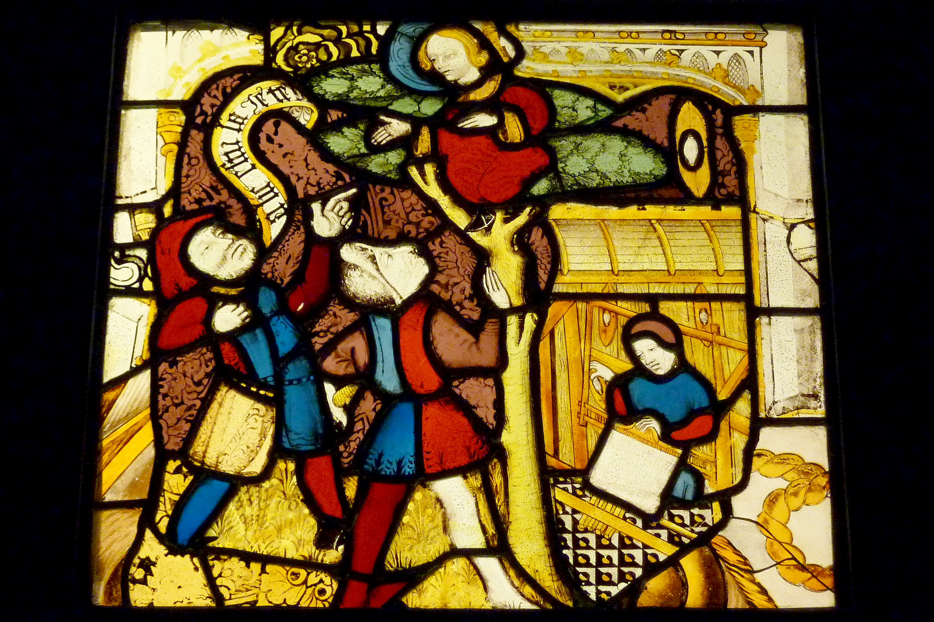 Bleiglasfenster im Musée National du Moyen Âge (Hôtel de Cluny) in Paris; Herkunft: Provins (Département Seine-et-Marne), Hôtel Dieu, 1. Hälfte 15. Jahrhundert; Darstellung: Szene aus dem Leben von Saint Lié von Savins [1]